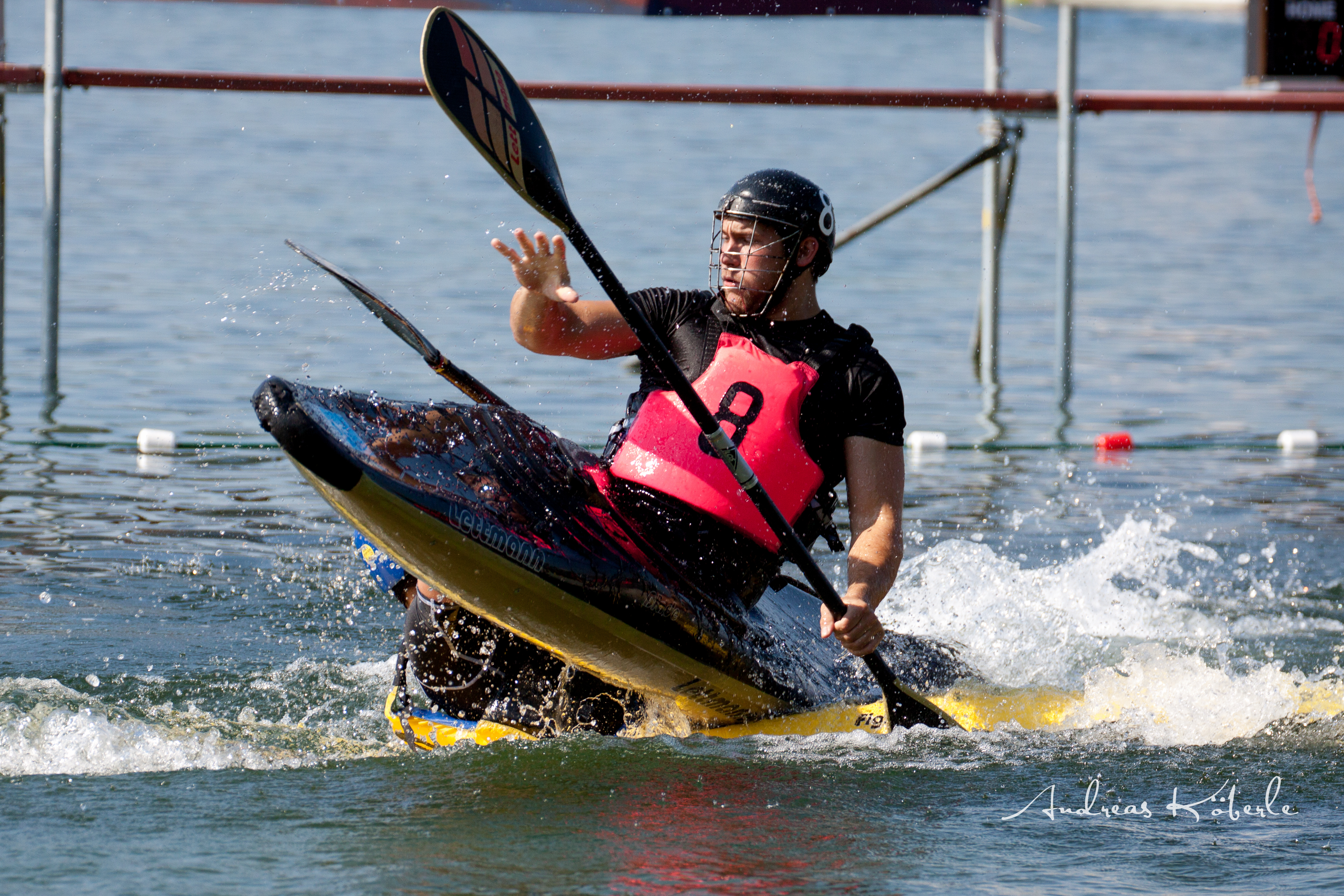 Kanupolo Bundesliga